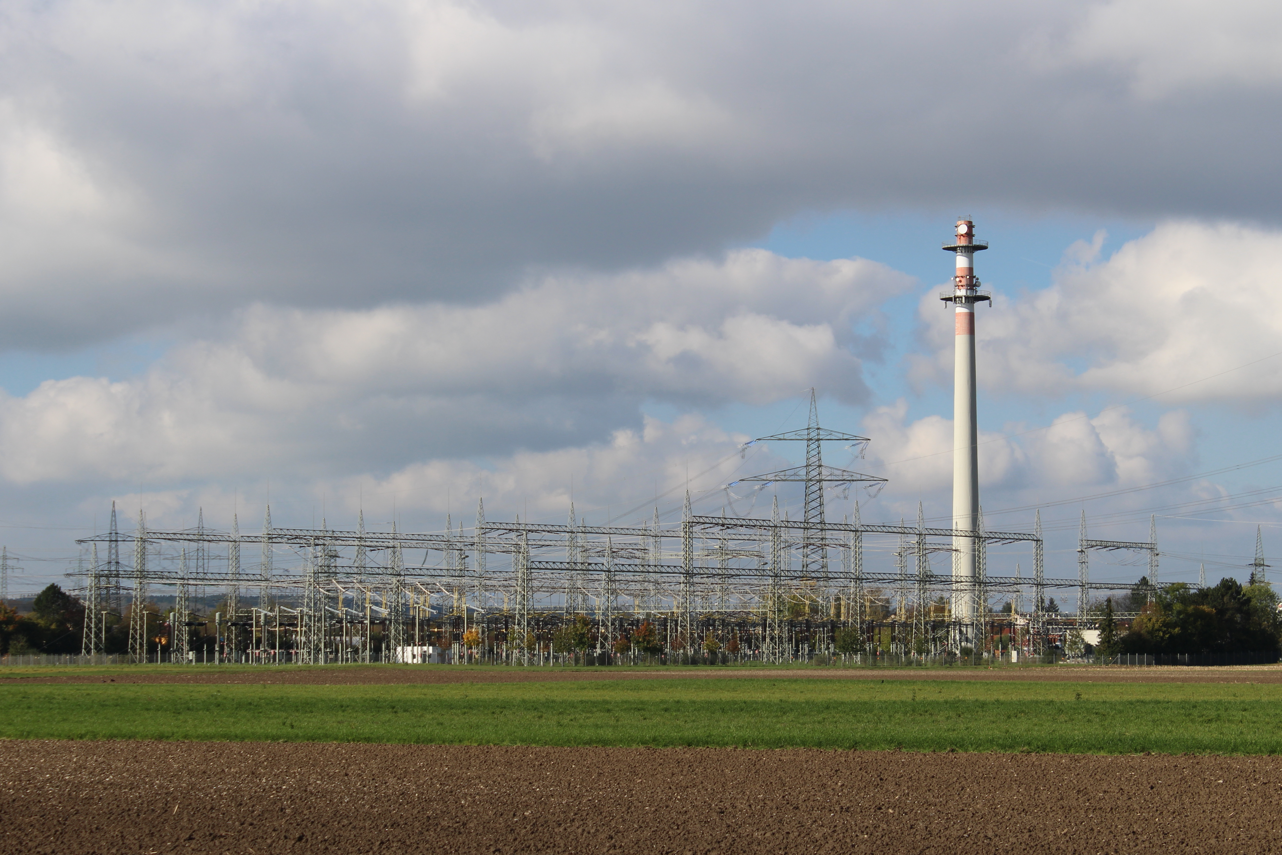 Amprion-Umspannwerk Vöhringen mit Richtfunkturm